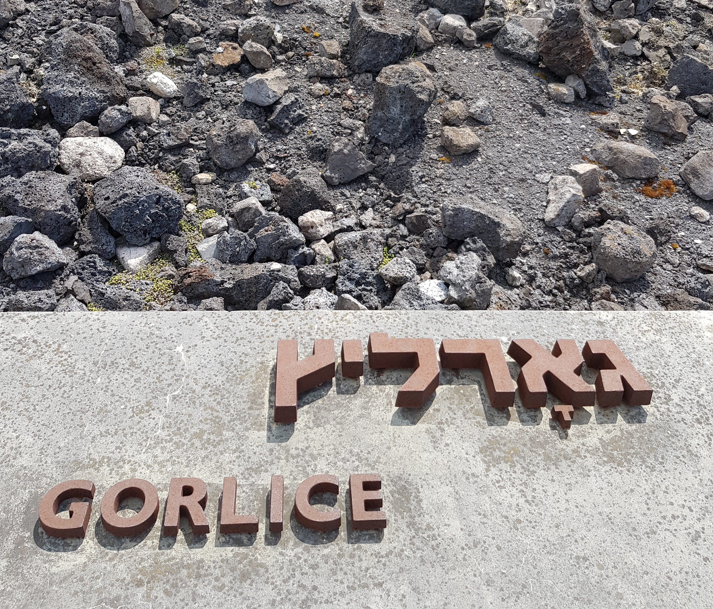 השם גורליצה כתוב בין שמות הערים שמהן נשלחו יהודים לבלז'ץ